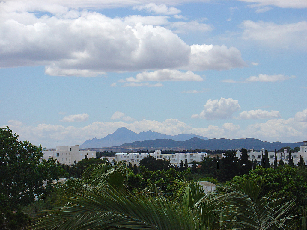 Hammamet, Tunisia.